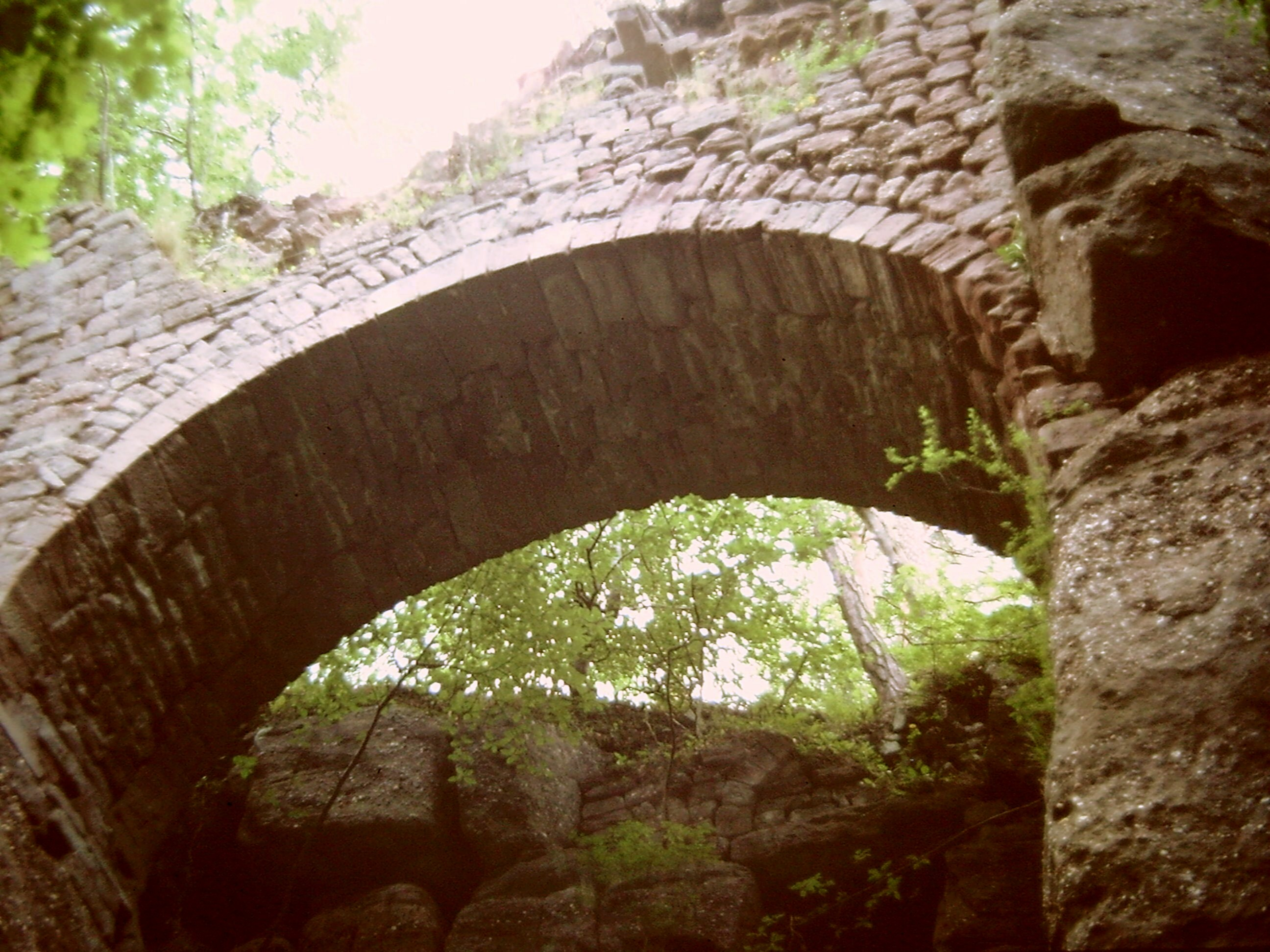 Château du HAGELSCHLOSS, la grande arche